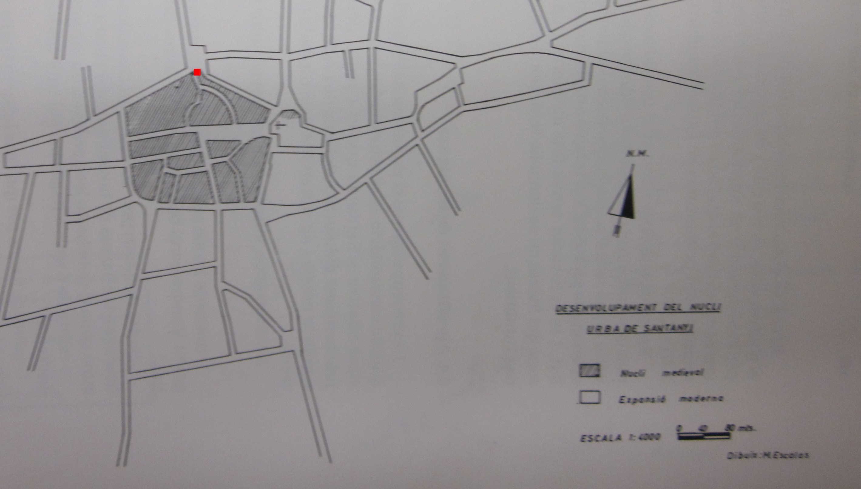 Mapa santanyi antic